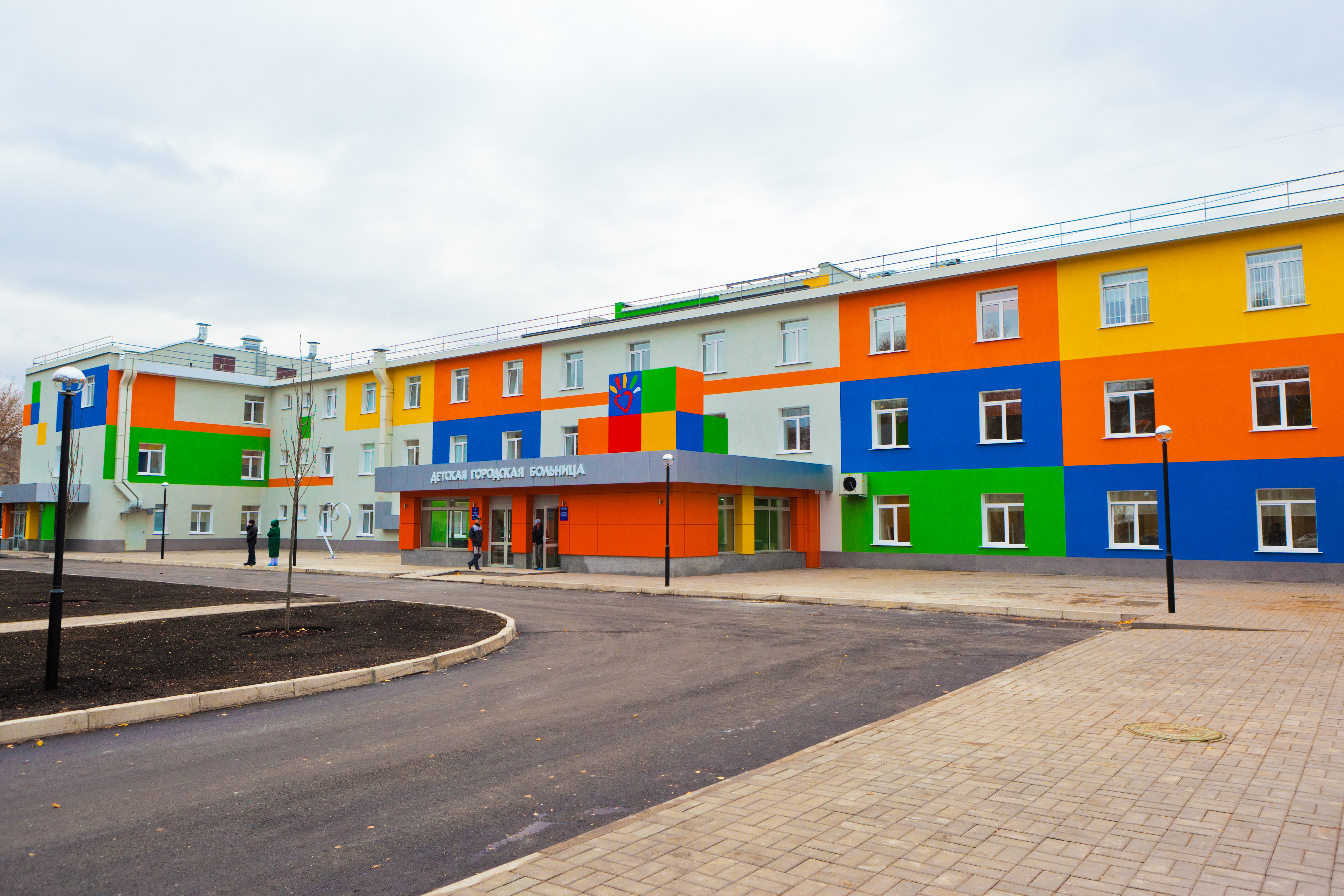 Детская городская больница